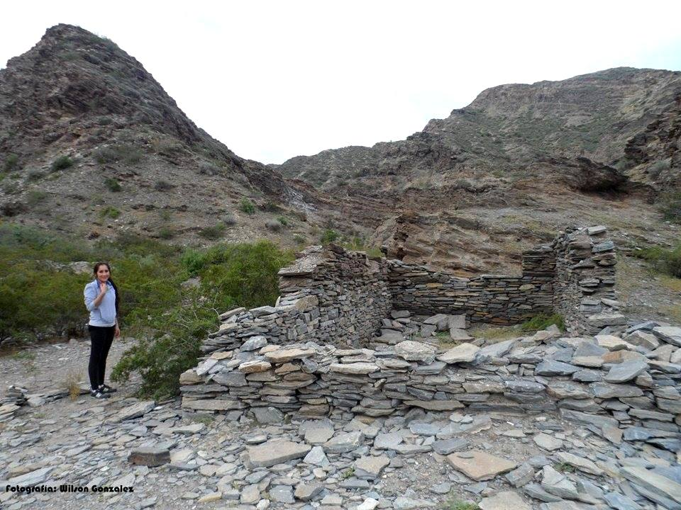 Atractivo paisaje a mitad de camino antes de llegar al "Baño del Indio". Casa de pirca (hecha de piedra sobre piedra).